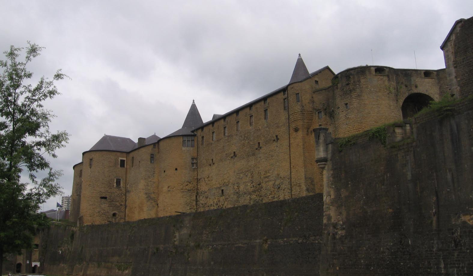 Sedan